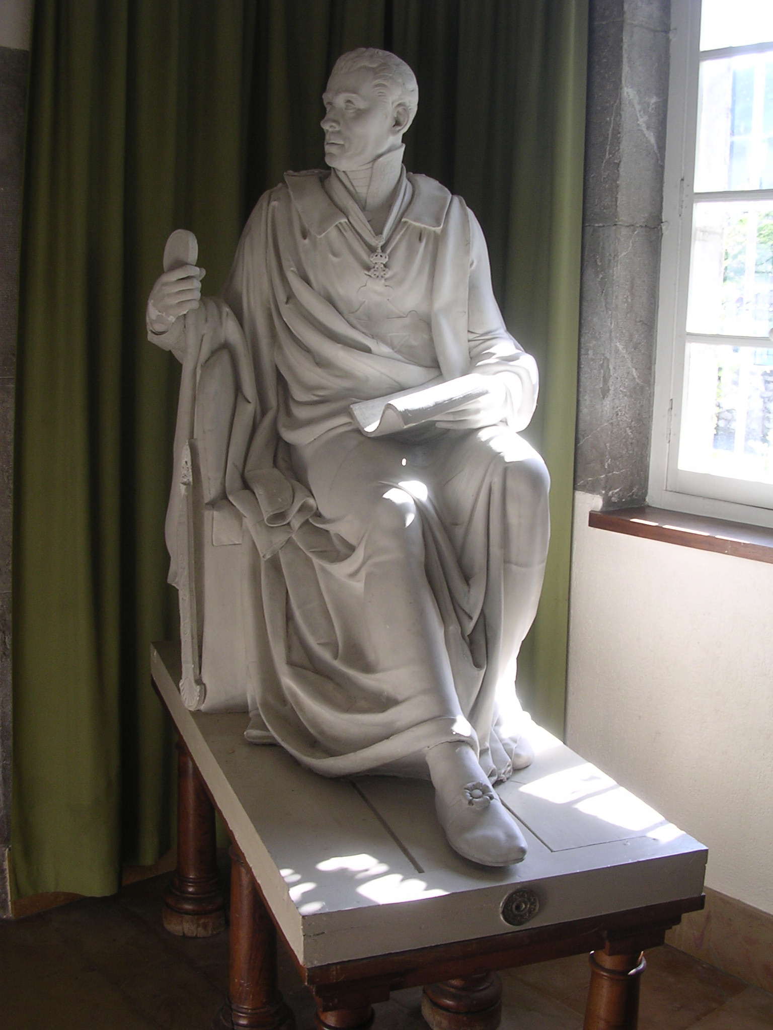 Statue de Benoît de Boigne, général, comte, et homme politique français, 1751-1830. Sculptée au milieu du XIXème siècle. Exposée au sein de la Maison Saint-Benoît, Chambéry, France